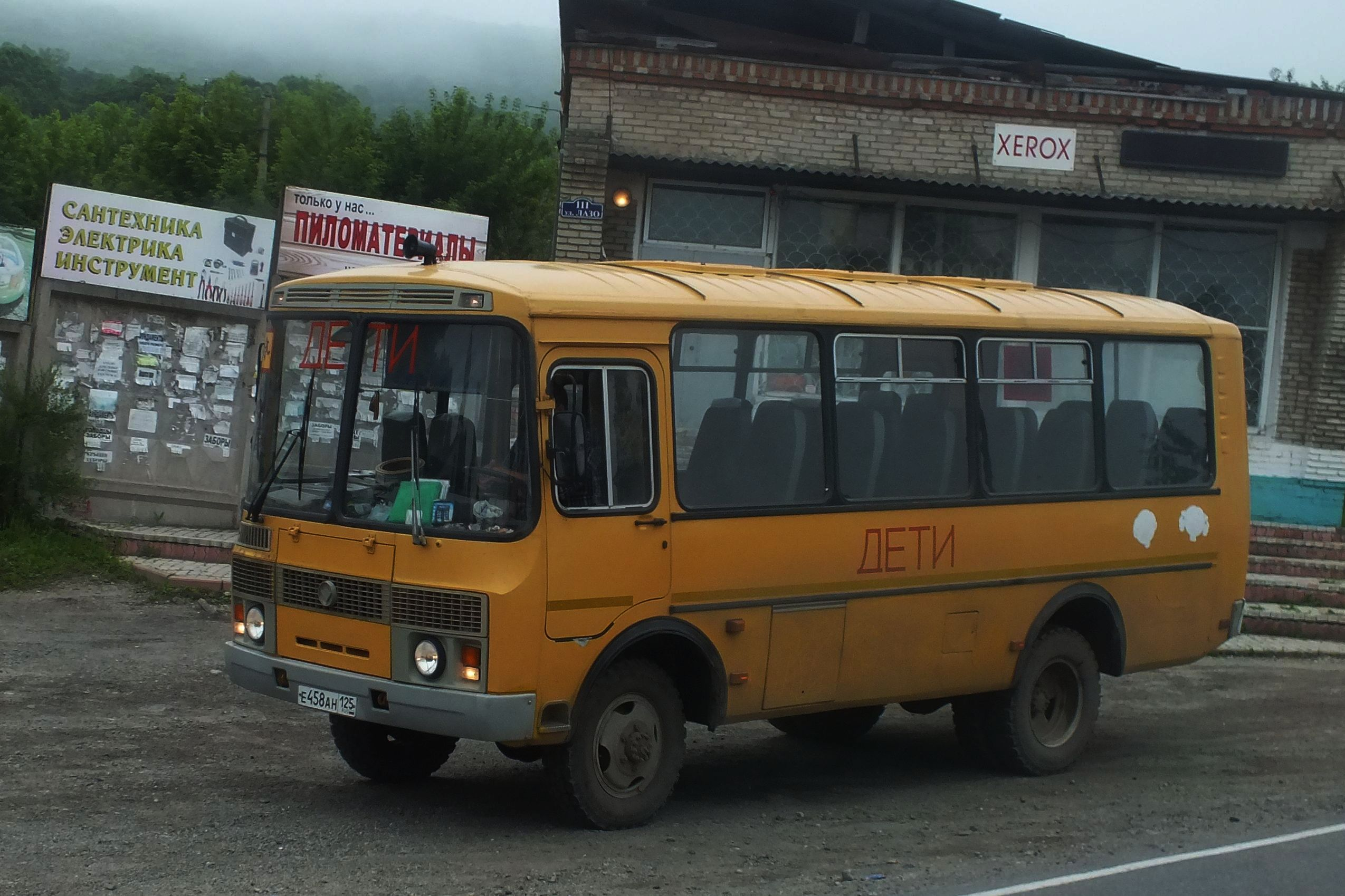 PAZ-3206